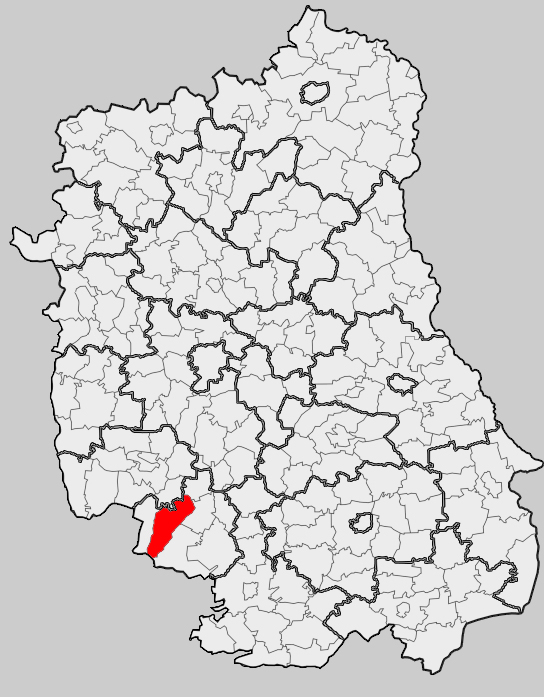 Map of gmina Modliborzyce, Janów Lubelski county, Lublin voivodship Mapa gminy Modliborzyce, powiat janowski, województwo lubelskie